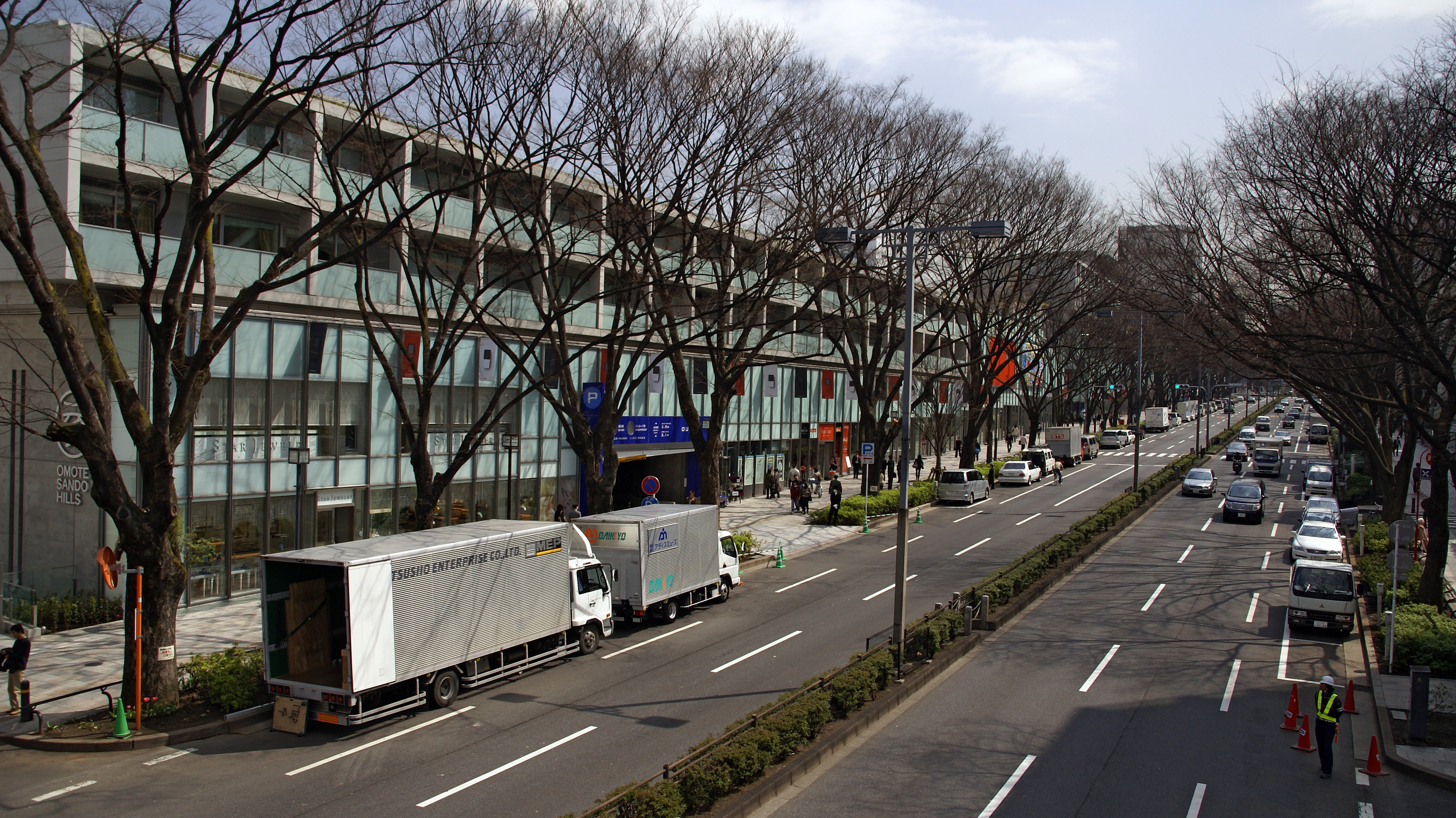 Omotesando-street in Shibuya-ku, Tokyo, Japan